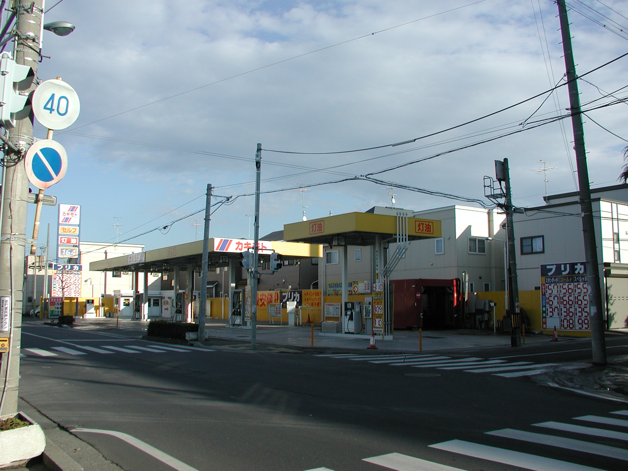 柿本石油 八戸江陽セルフスタンド ※：2008年10月6日以降、突然の休業状態が続いている。